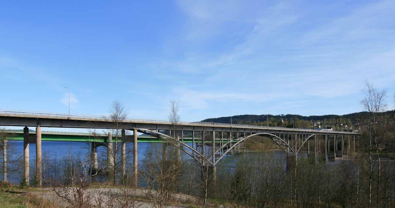 Minnesundbrua, Eidsvoll, Norway.